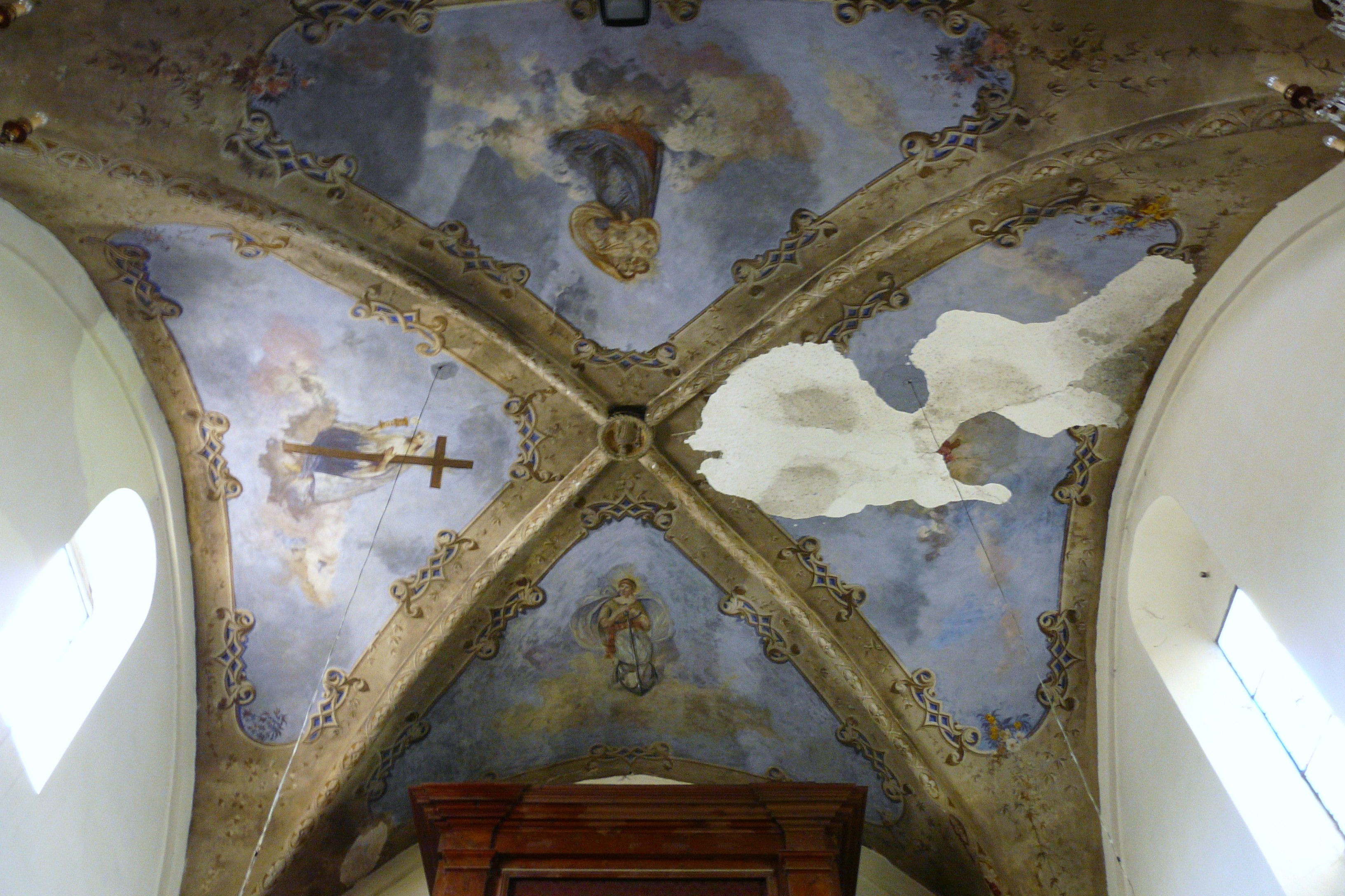 Santuario delle Grazie, Porto Venere, Liguria, Italia